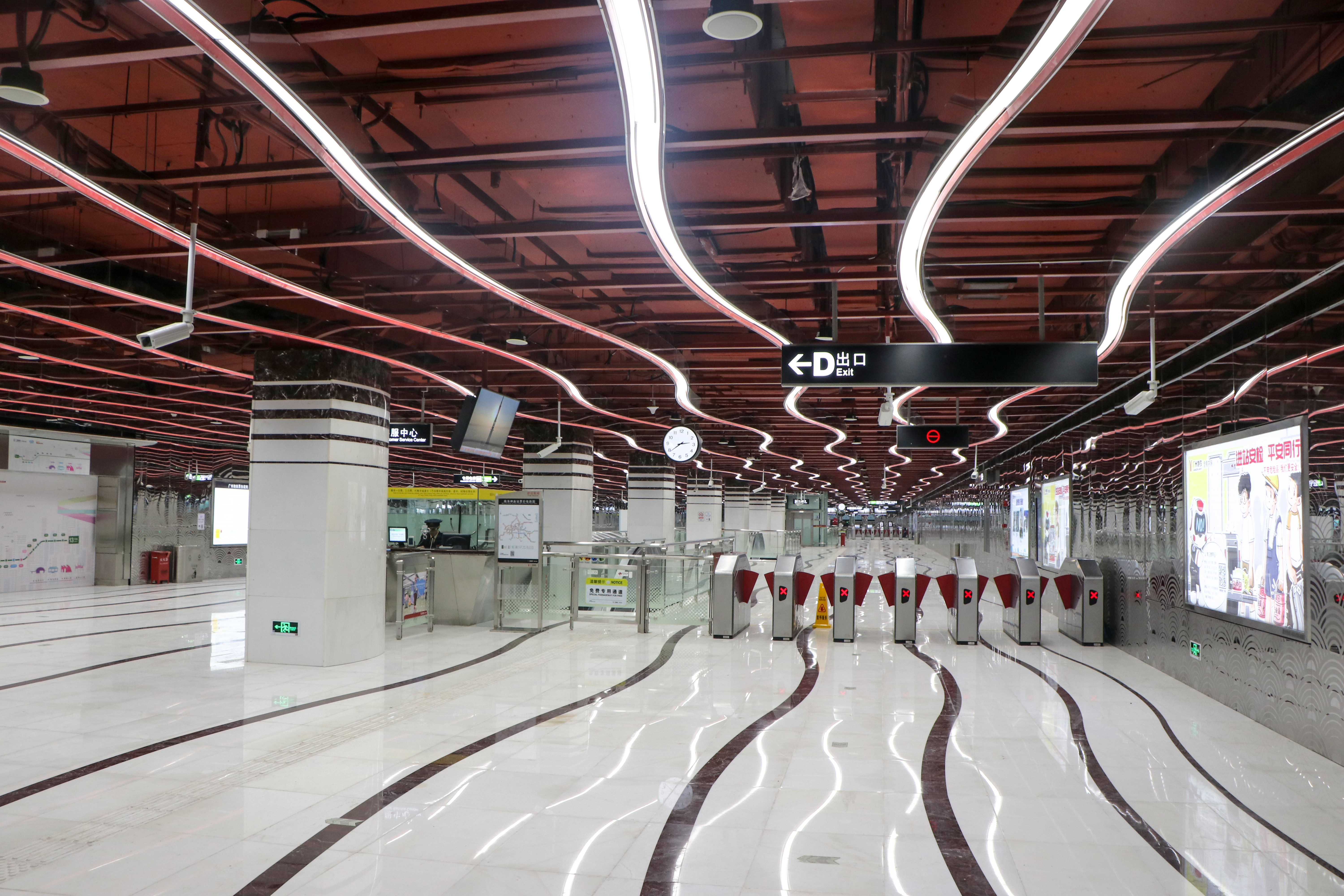 广州地铁南海神庙站